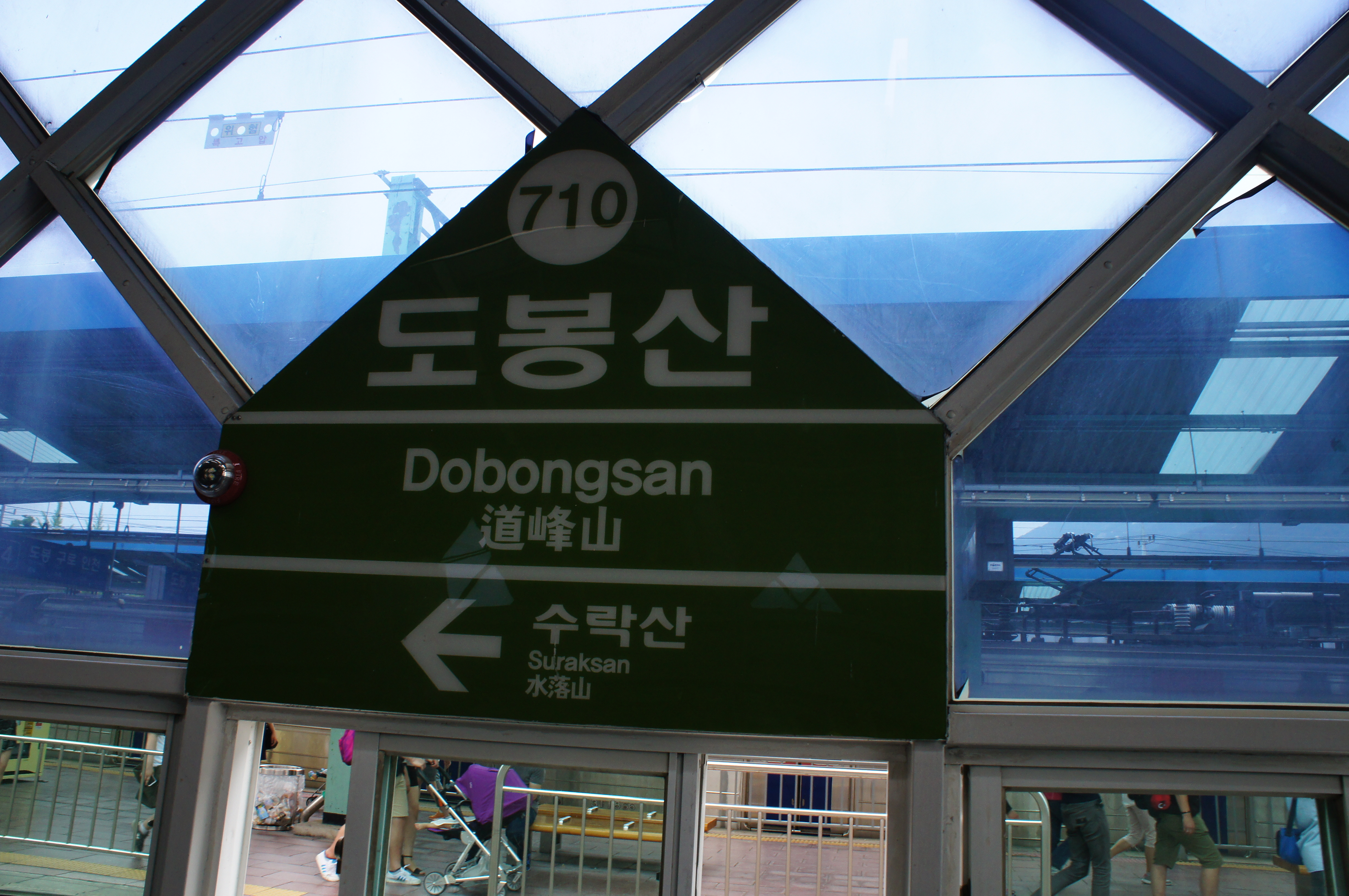 7호선 도봉산역 역명판